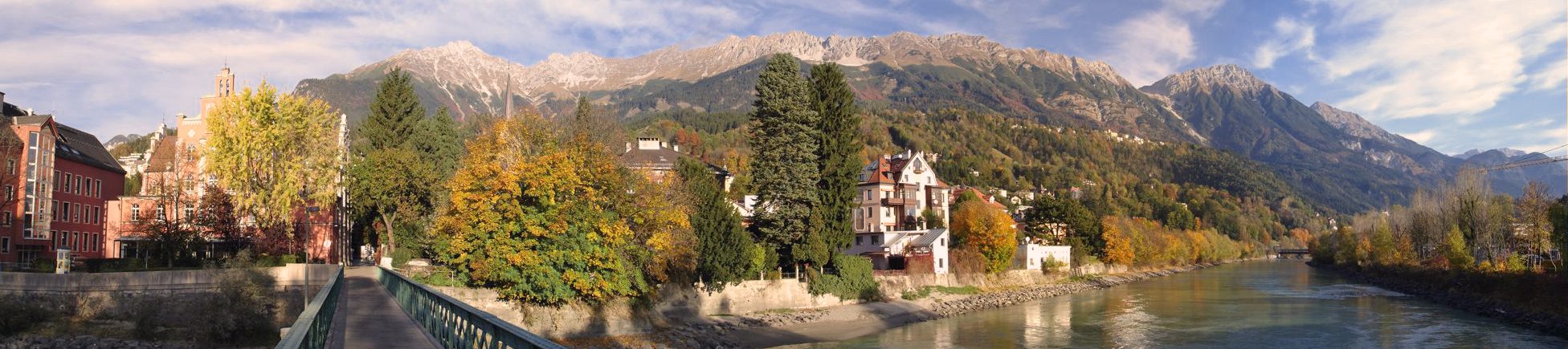 Blick auf die Nordkette vom Émile-Béthouart-Steg aus